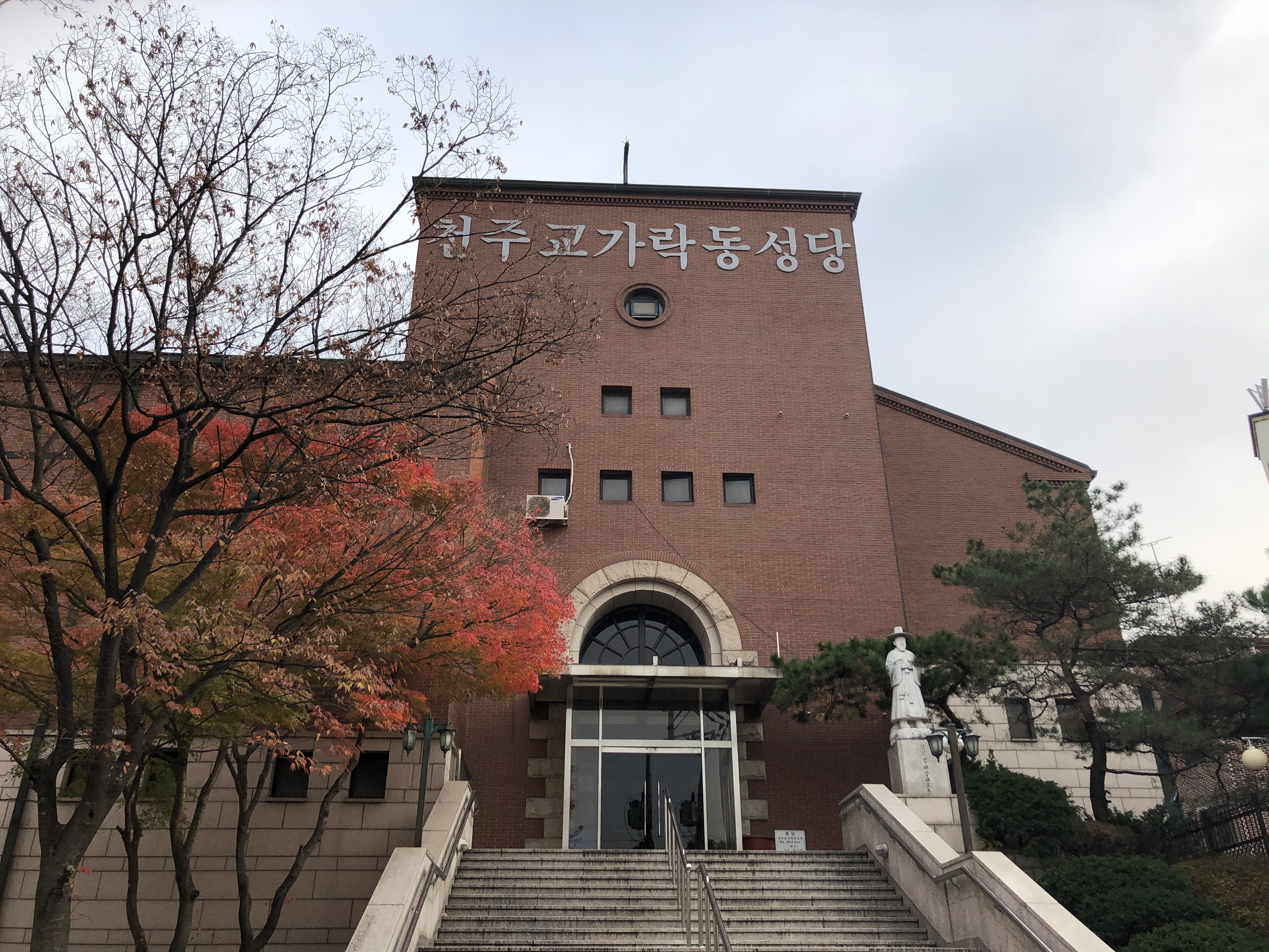 천주교 가락동 성당 성인: 정하상 바오로